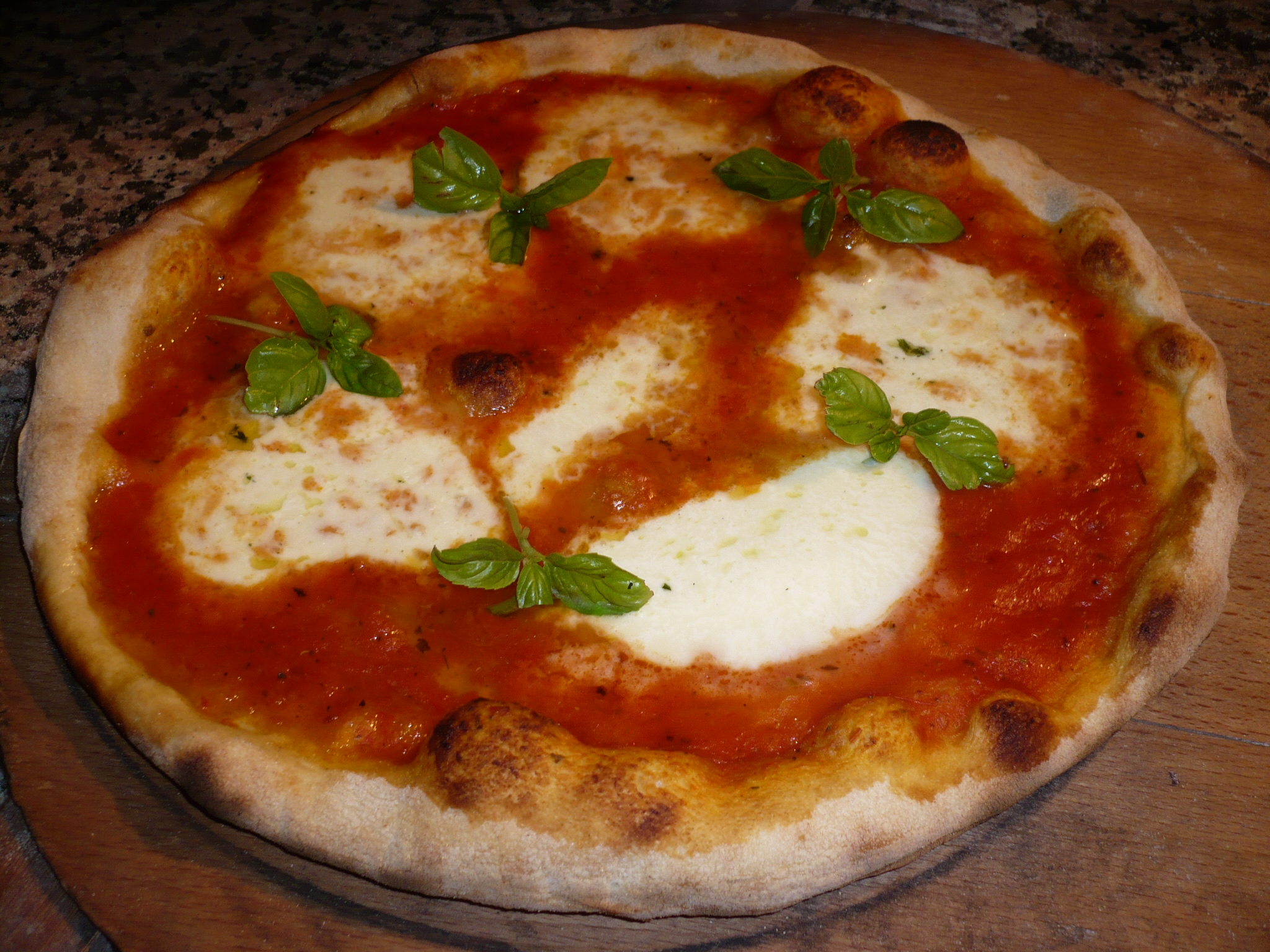 PIZZA-BRAISES 56450 THEIX FRANCE